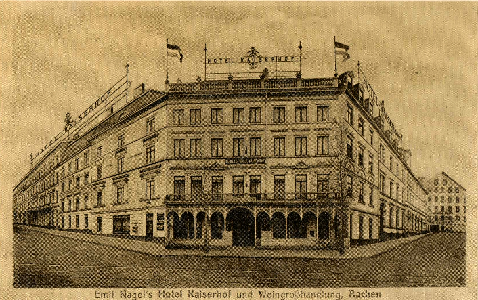 Das Hotel Kaiserhof (Aachen) auf der Theaterstrasse (1913)